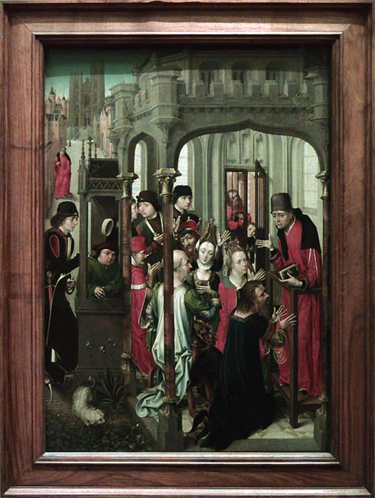 Instruction Pastorale, ou la prédication de Saint Géry